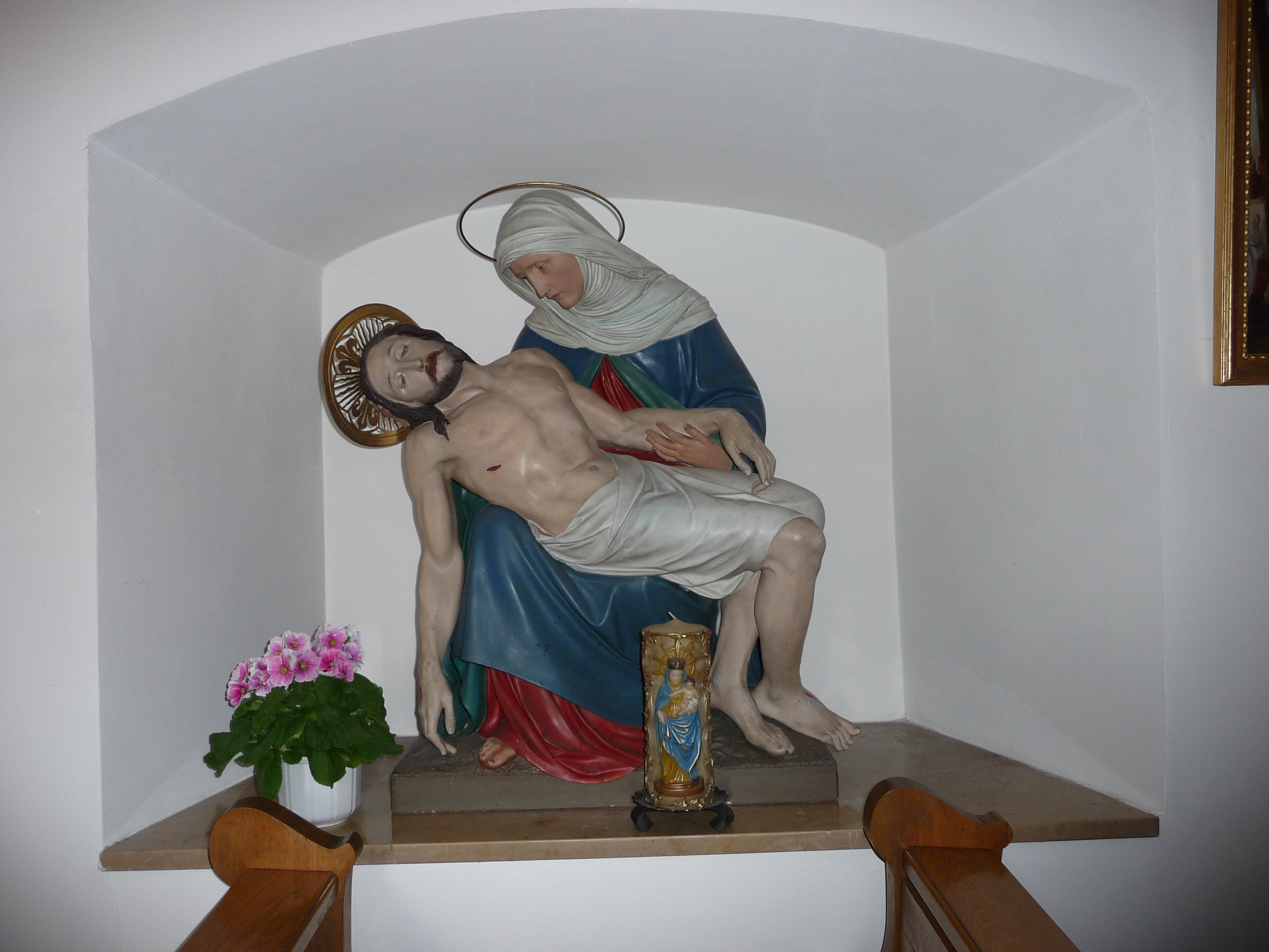 Die Pieta von der Pfarrkirche St. Gertrud in Dinkelshausen